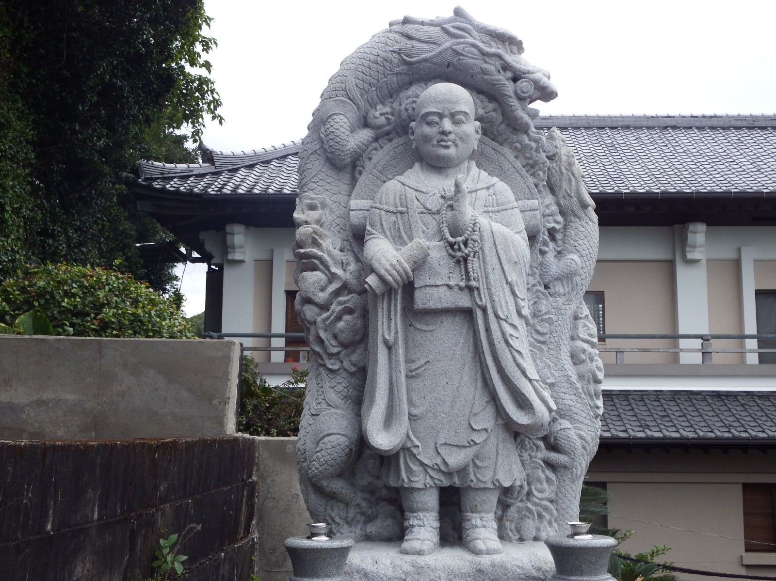 津照寺の写経大師尊像